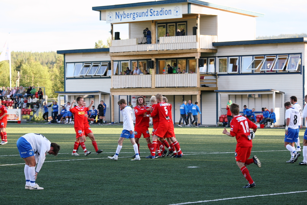 Nybergsund-SF 39